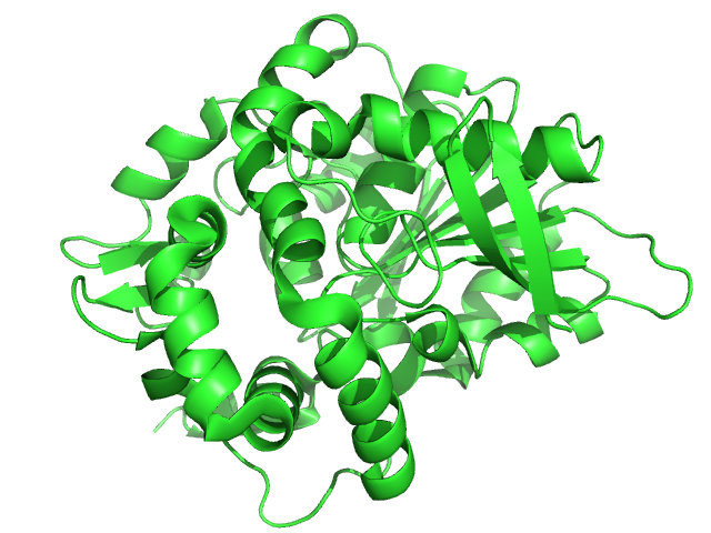 Epoxide Hydrolase B from Mycobacterium tuberculosis